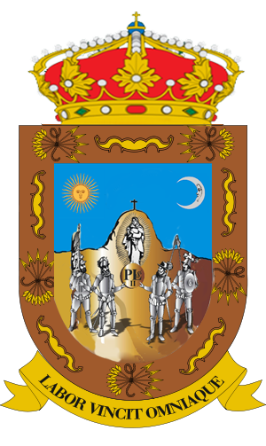 escudo de armas